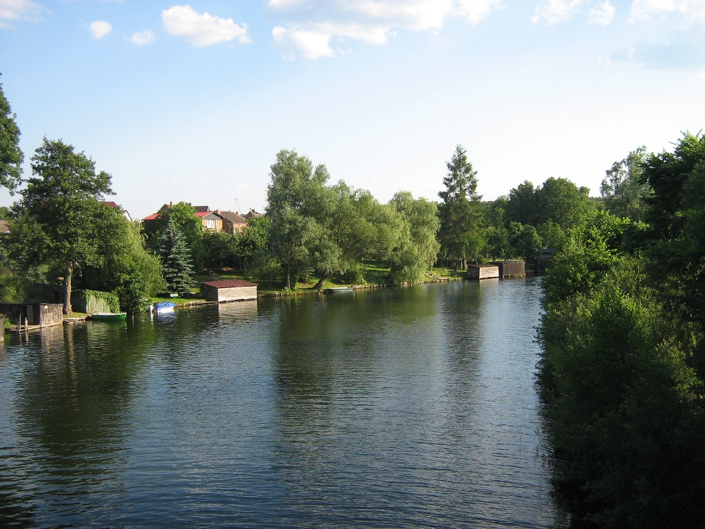 Die Havel bzw. der Wesenberger Kammerkanal bei Priepert in der Mecklenburgische Seenplatte (Landkreis Mecklenburgische Seenplatte).